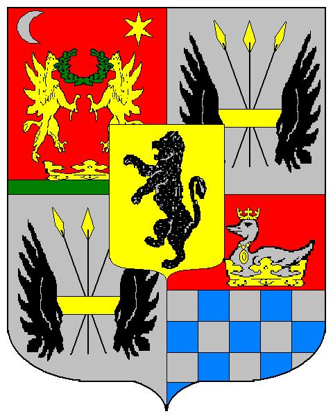 Grb obitelji Begna